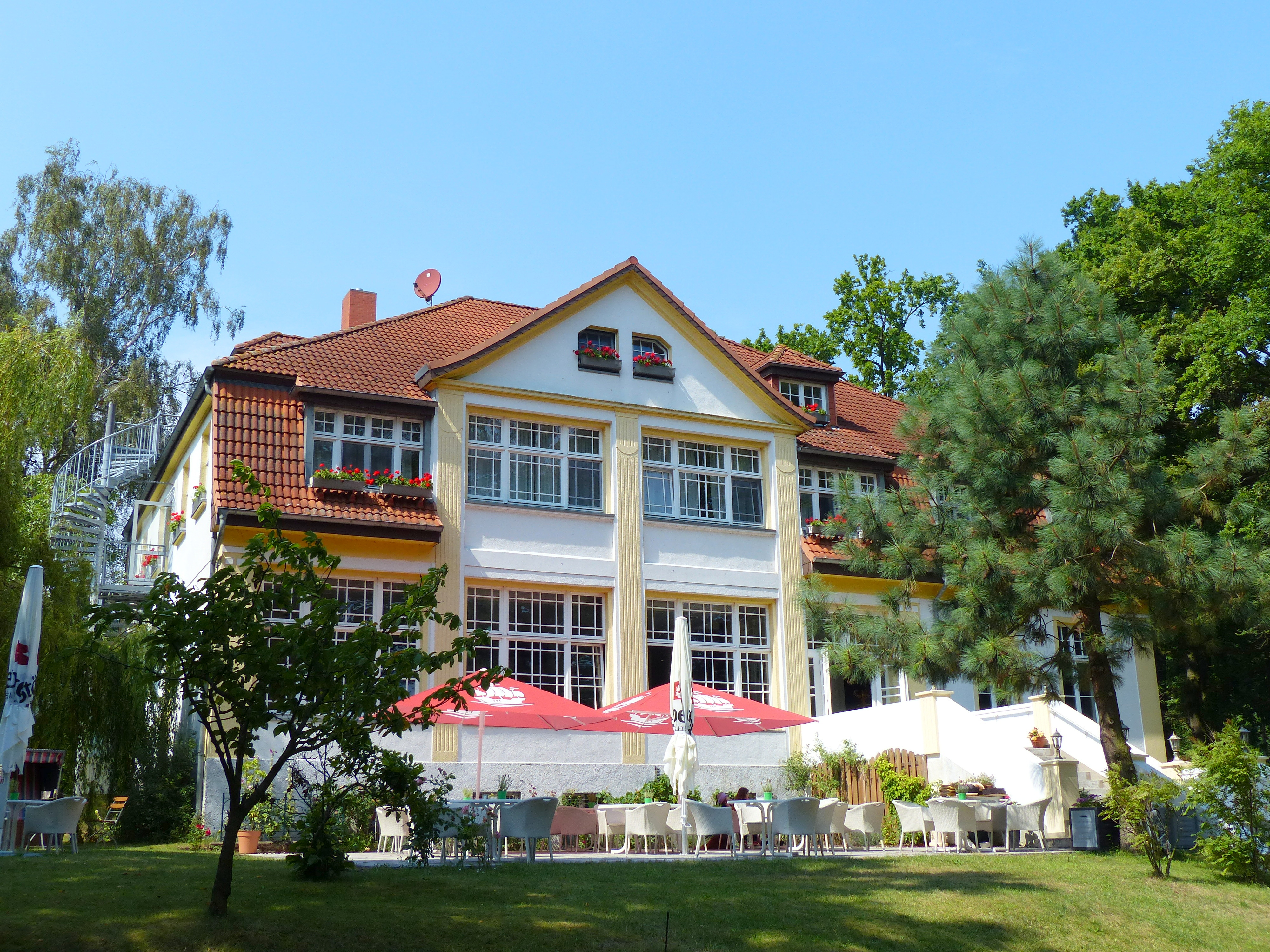 Korswandt, Hotelrestaurant Idyll am Wolgastsee, Seeseite mit Terrasse